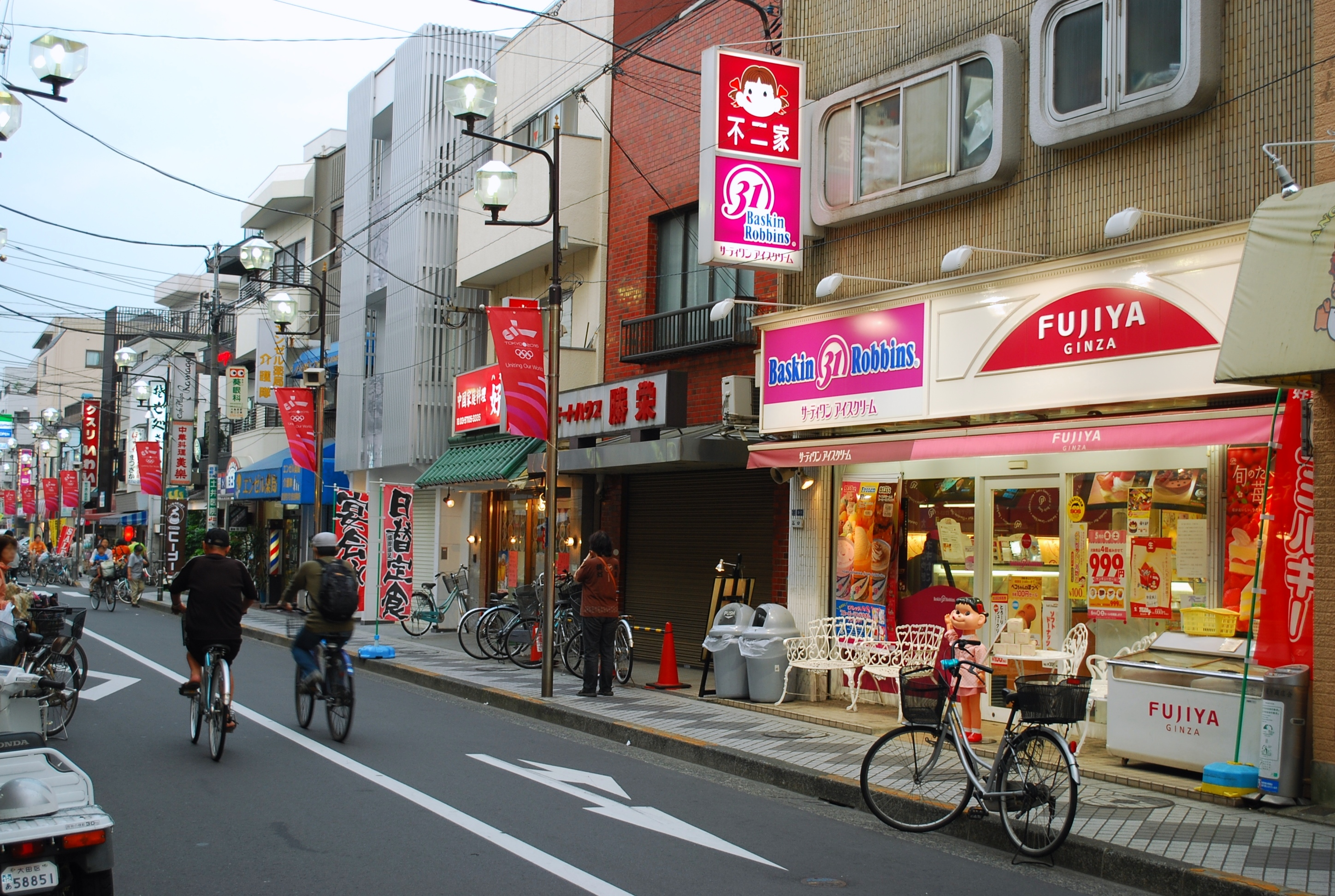 サーティーワン糀谷店